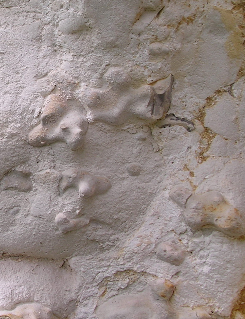 Vue d'un calcaire du Turonien dans le Vendômois